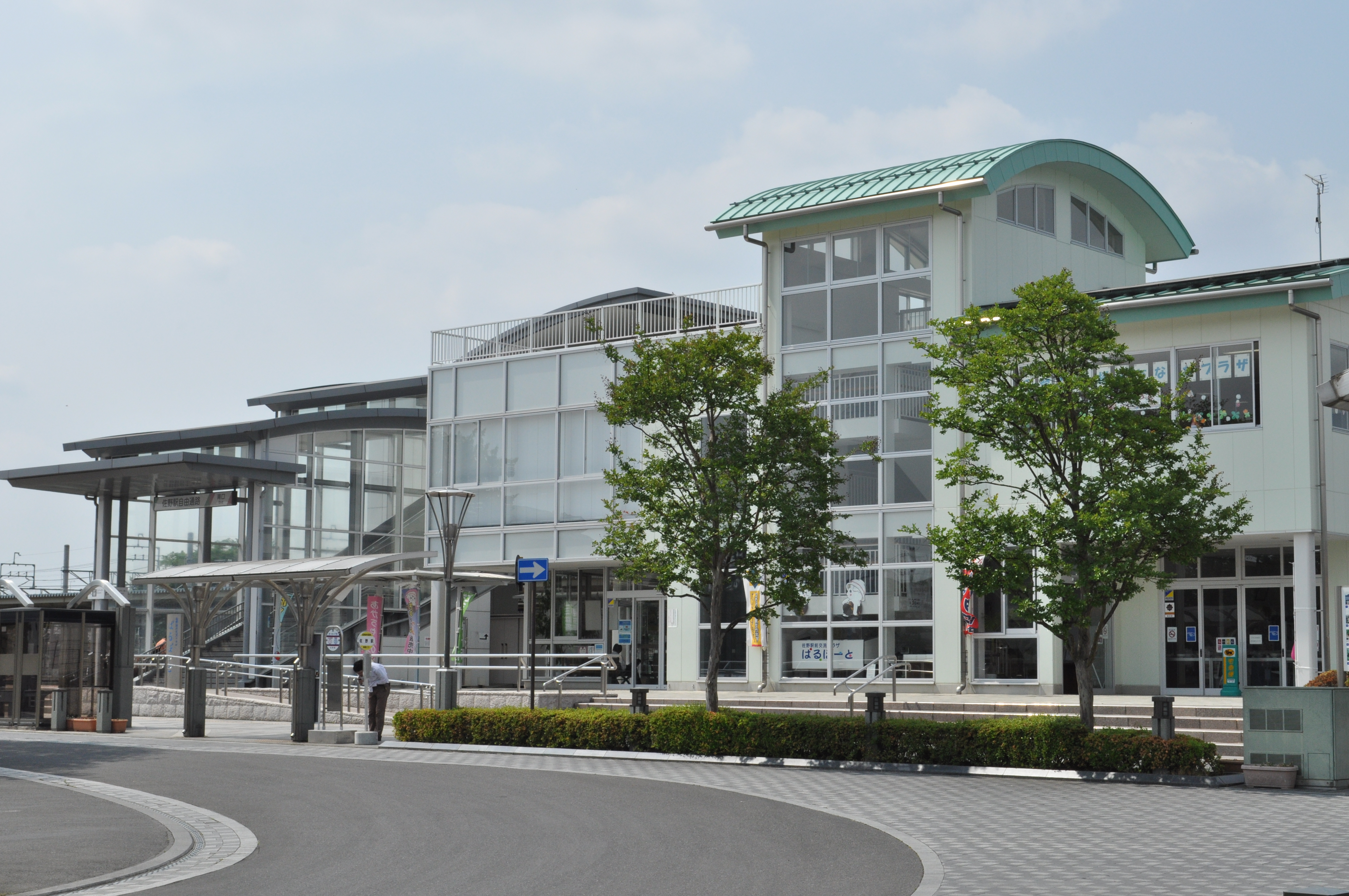 JR佐野駅南口